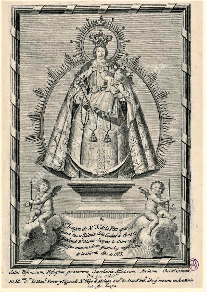 Grabado del S. XVIII que representa a la Virgen de la Paz con una iconografía distinta a la de la pintura.